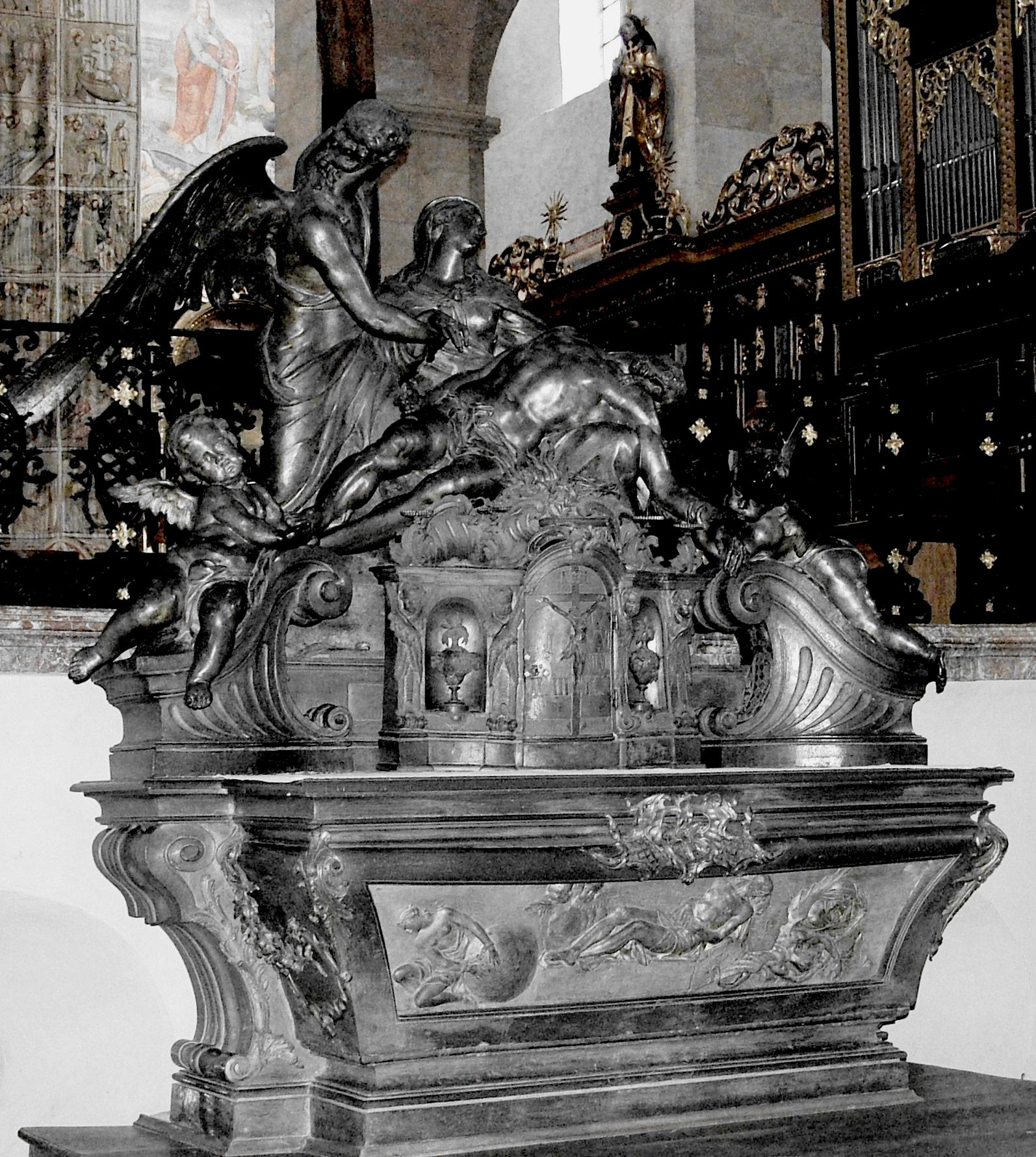 A gurki székesegyház (Ausztria) keresztoltára (Georg Raphael Donner munkája)